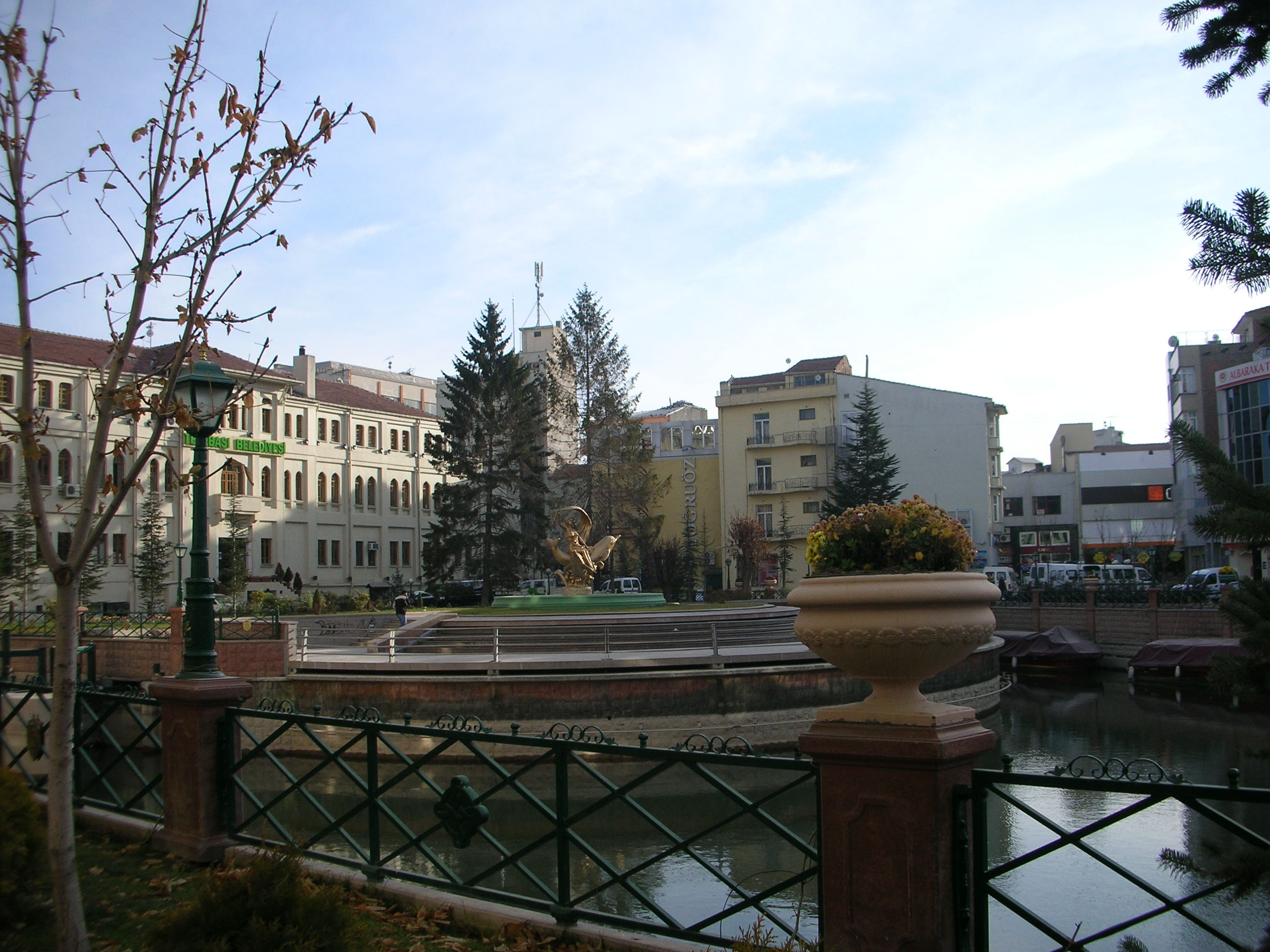 Uno scorcio del fiume che attraversa Eskisehir, Turchia. Immagine realizzata da pnc_net